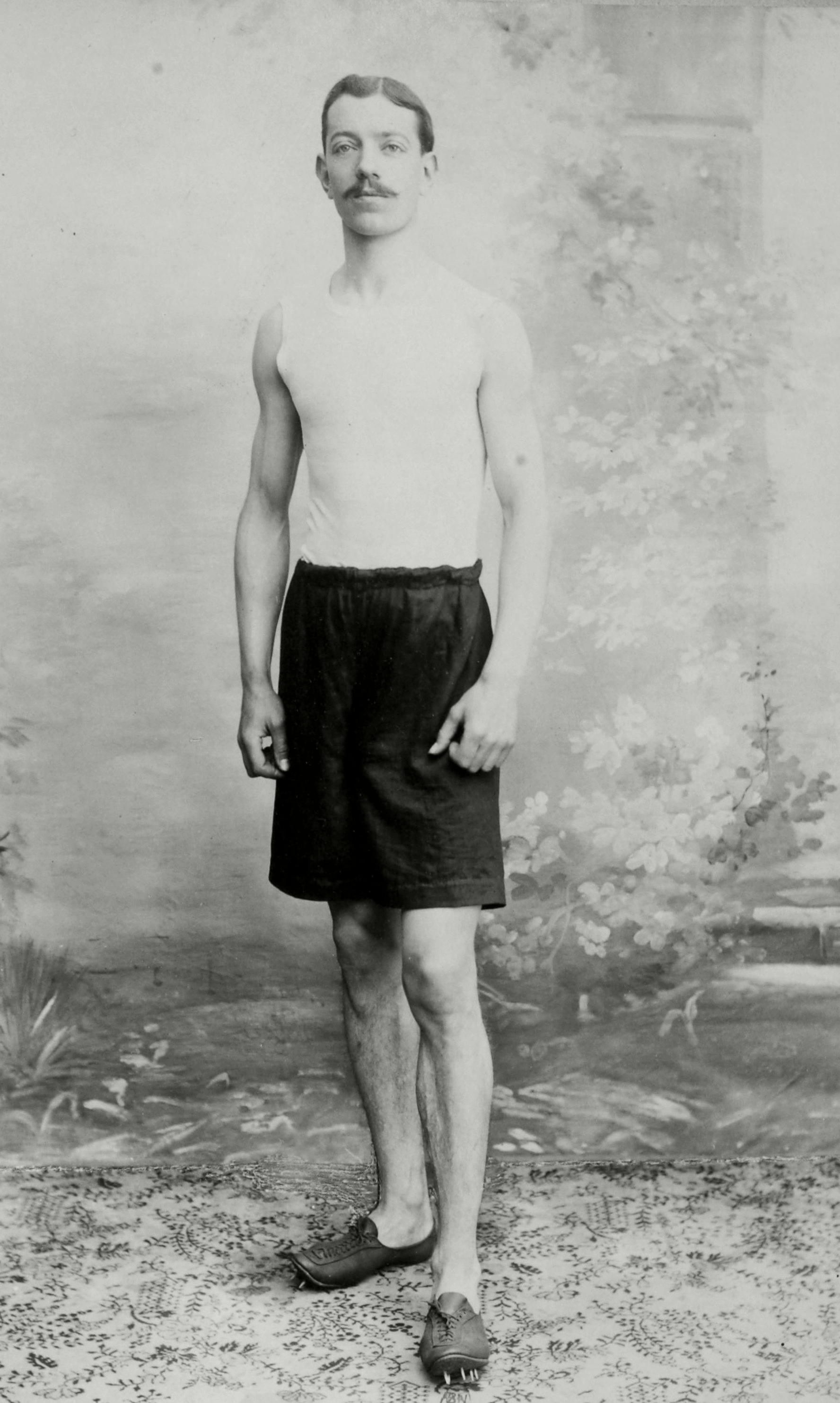 [Collection Jules Beau. Photographie sportive] : T. 29. Année 1905 / Jules Beau.